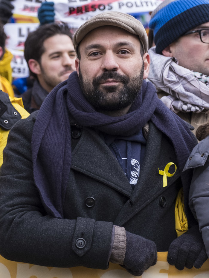 Manifestació per al 7 de desembre de 2017 a Brussel·les per reclamar l'alliberament dels presos catalans per haver defensat la creació de la República Catalana